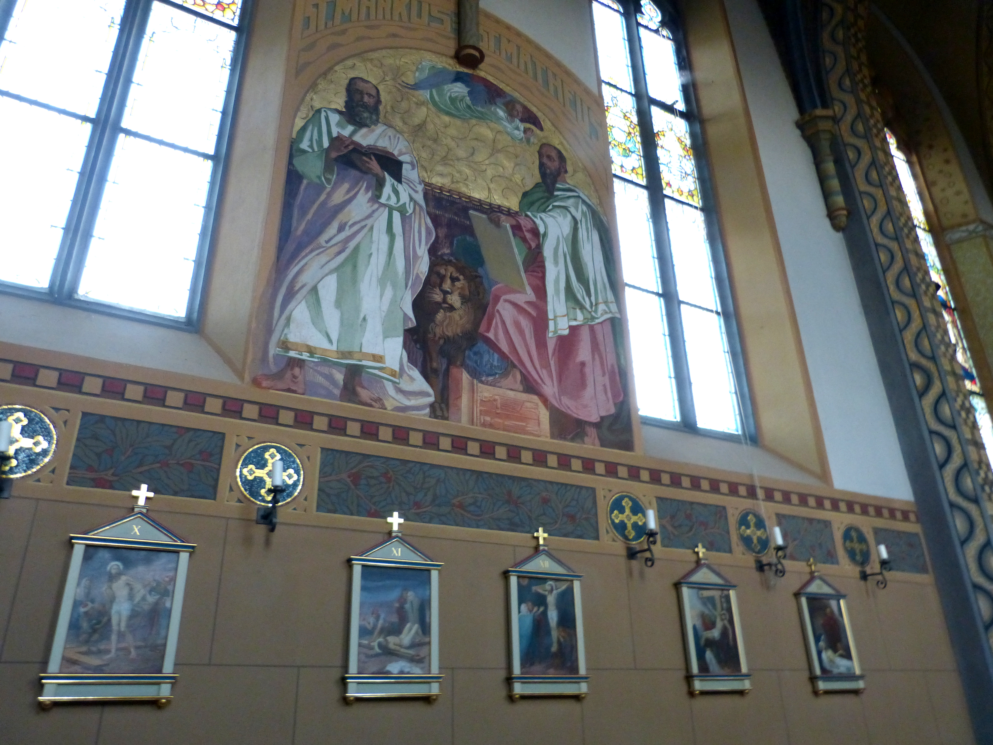 Wallfahrtskirche Maria Hilf am Locherboden, Mötz, Tirol